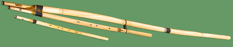 Eine Launeddas